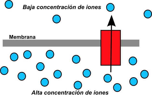 made for chemiosmosis article from Chemiosmosis1.svg